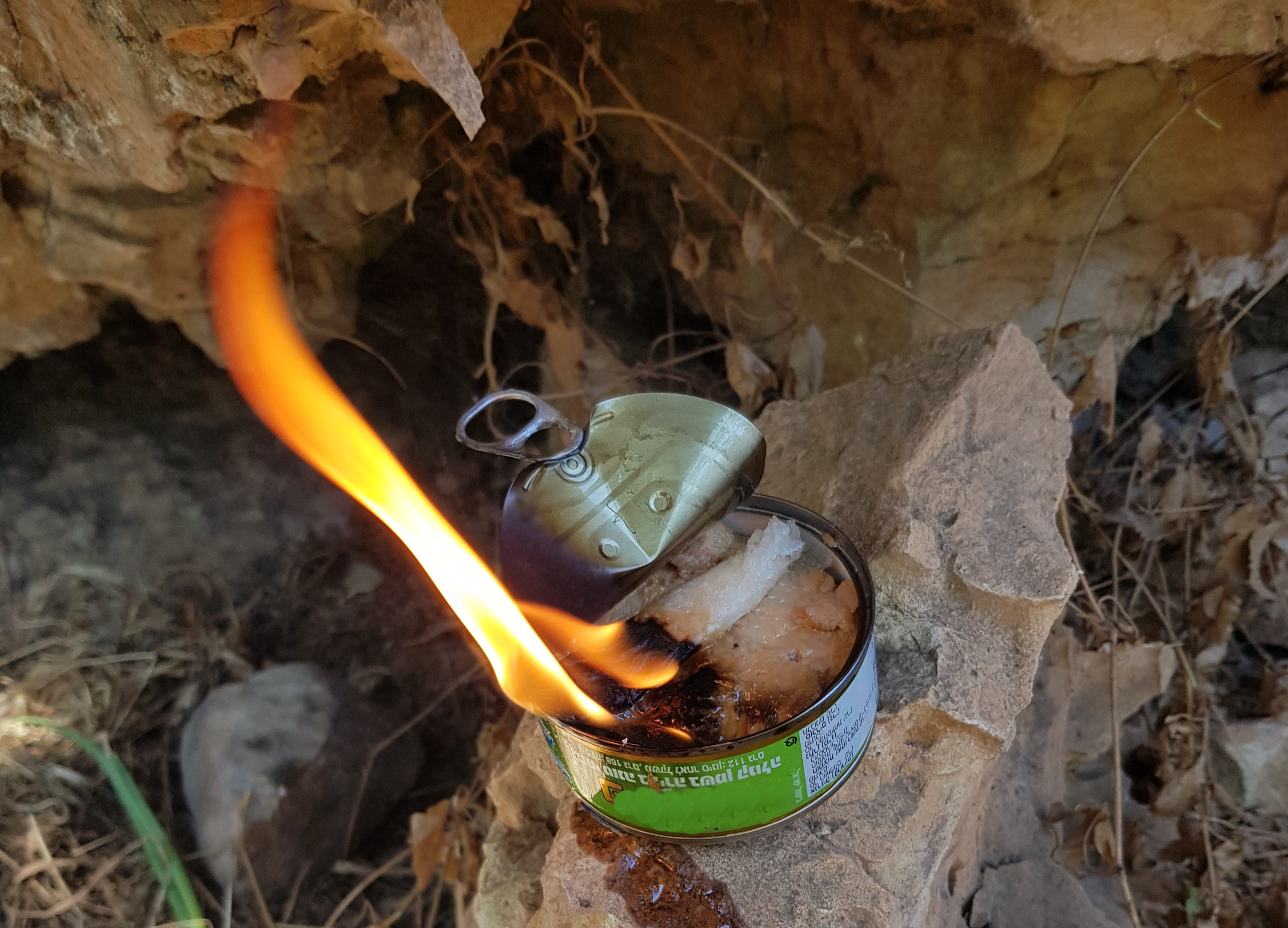 שיטה לעישון טונה בפחית שימורים